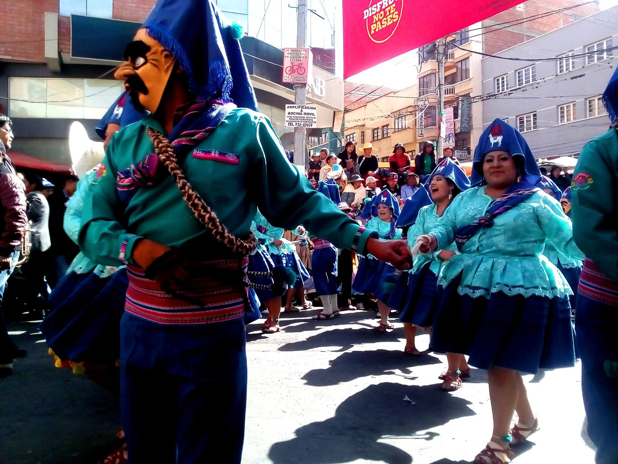 La Paz Bolivia 2017